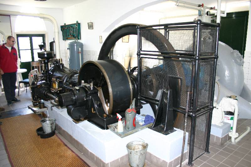 De binnenzijde van een dieselgemaal (Rijswijk-ZH, Nederland). Eigen werk/Made the picture myself. Arvey 15:35, 29 July 2005 (UTC)